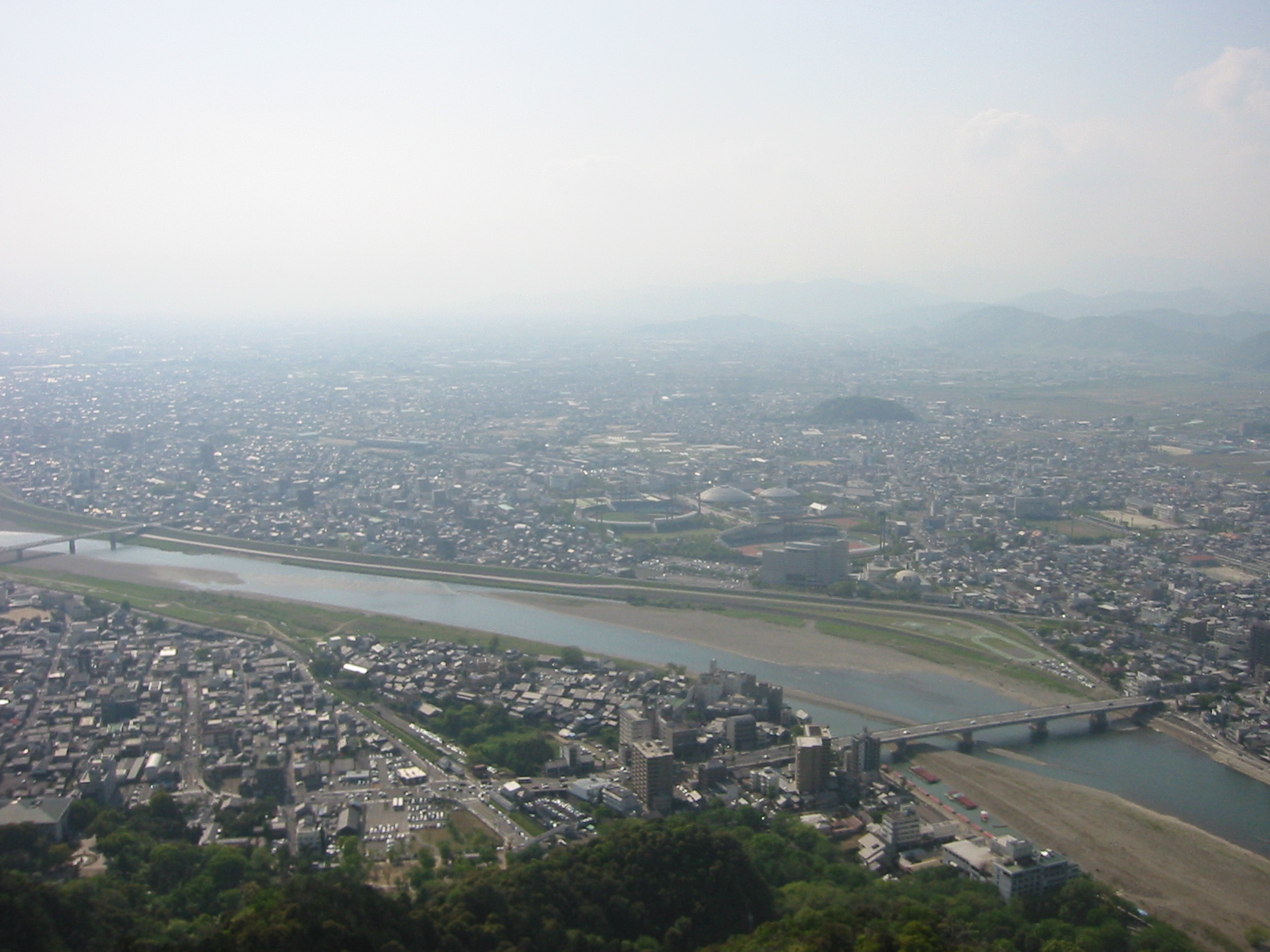 岐阜城にて